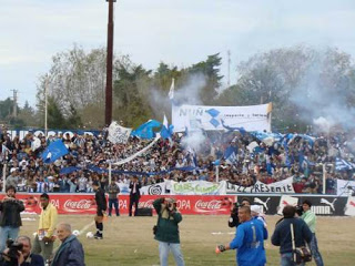 la 22, se hace llamar la barra del Cerro Largo Futbol Club